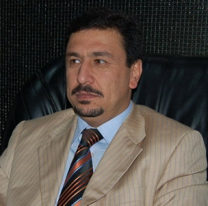 سياسي عراقي مستقل